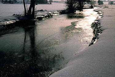 Die Wondreb im Winter